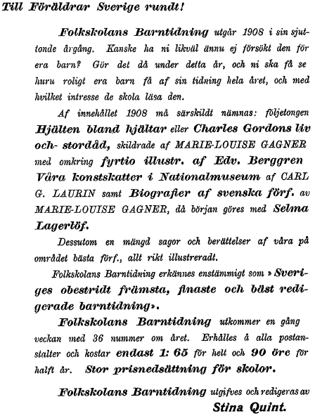 Annons i Tidskriften Dagny nr 1 2008. Beskriver syfte med tidskriften Folkskolans Barntidning (senare Kamratposten) och påvisar exempel ur tidningens innehåll 1908.